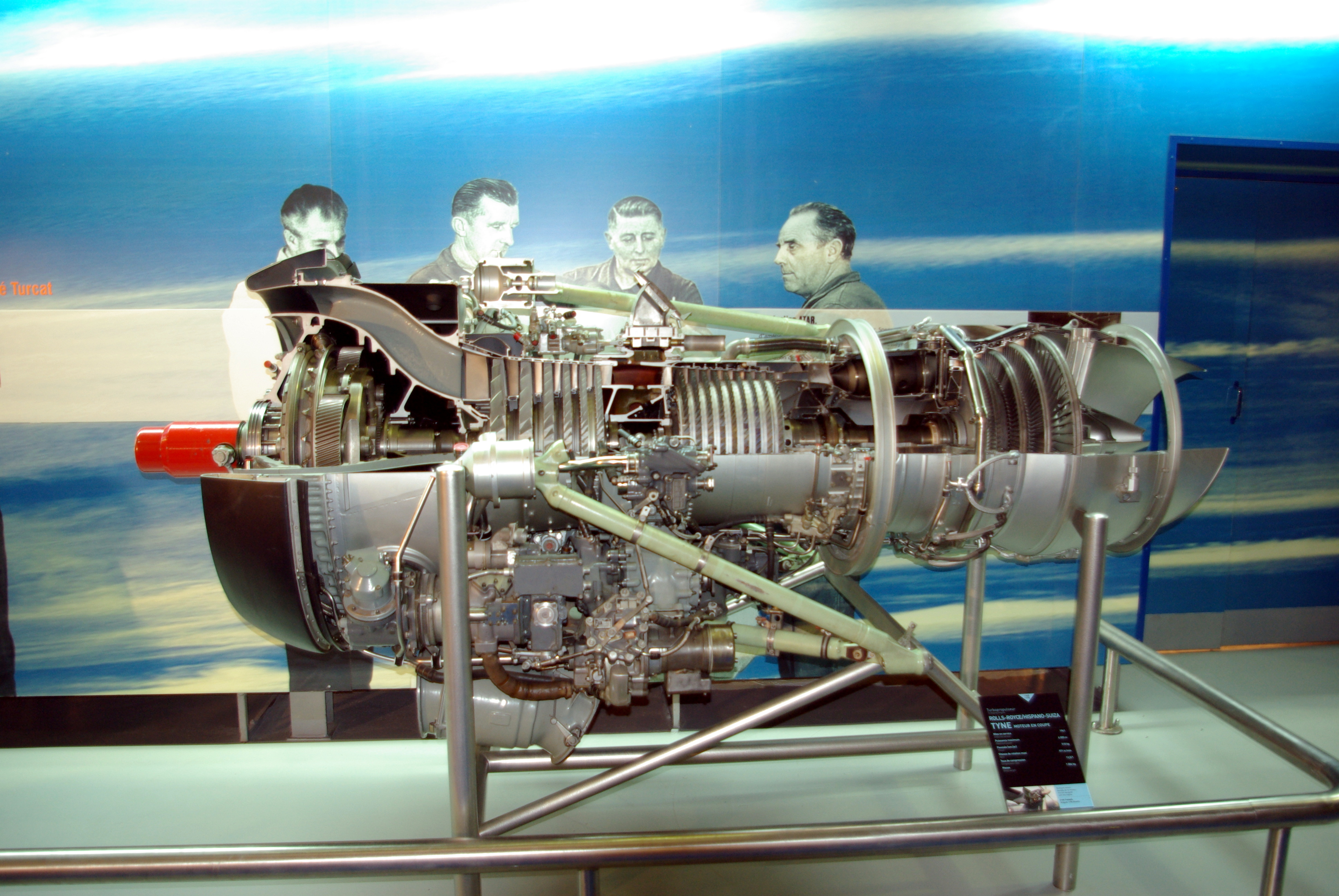 Rolls-Royce/Hispano-Suiza Tyne présenté au musée Safran.